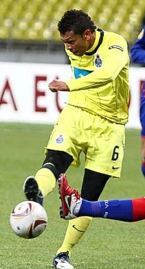 Фредди Гуарин